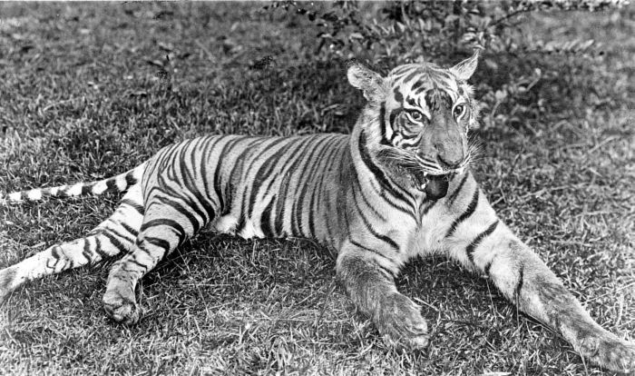 Repronegatief. Een koningstijger (Felis tigris) uit Midden-Asahan, Noord-Sumatra